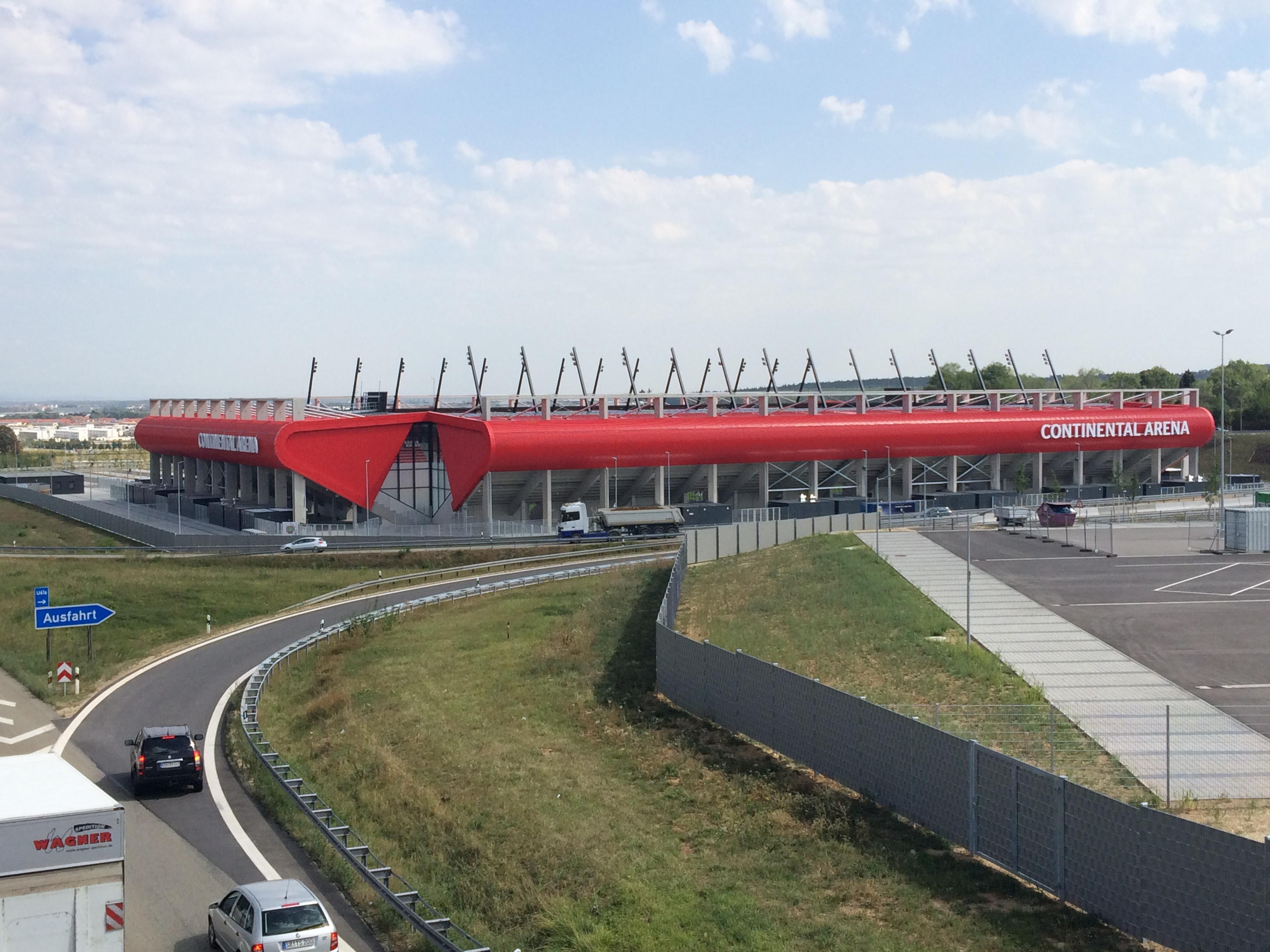 Stadionansicht der Continental Arena von Nordwesten